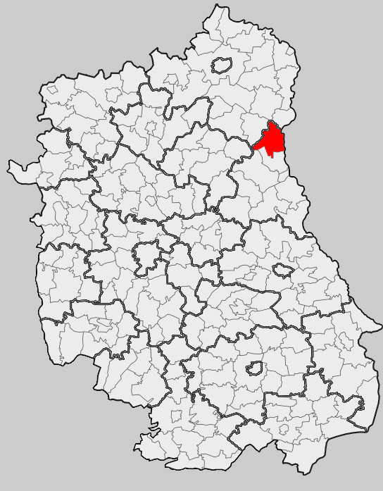 Map of gmina Hanna, Włodawa county, Lublin voivodship Mapa gminy Hanna, powiat włodawski, województwo lubelskie